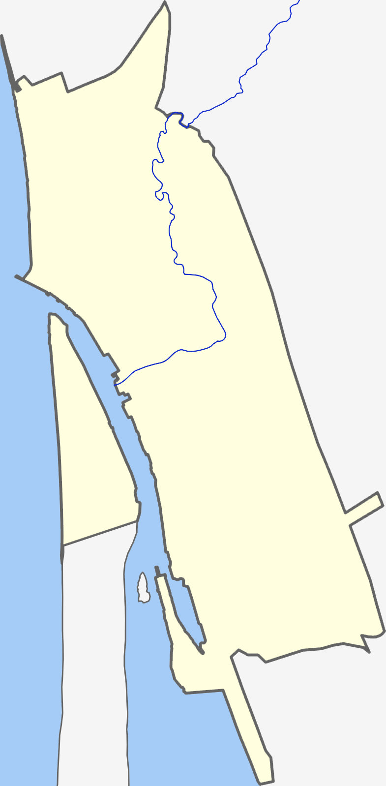 Klaipėdos miesto žemėlapis.